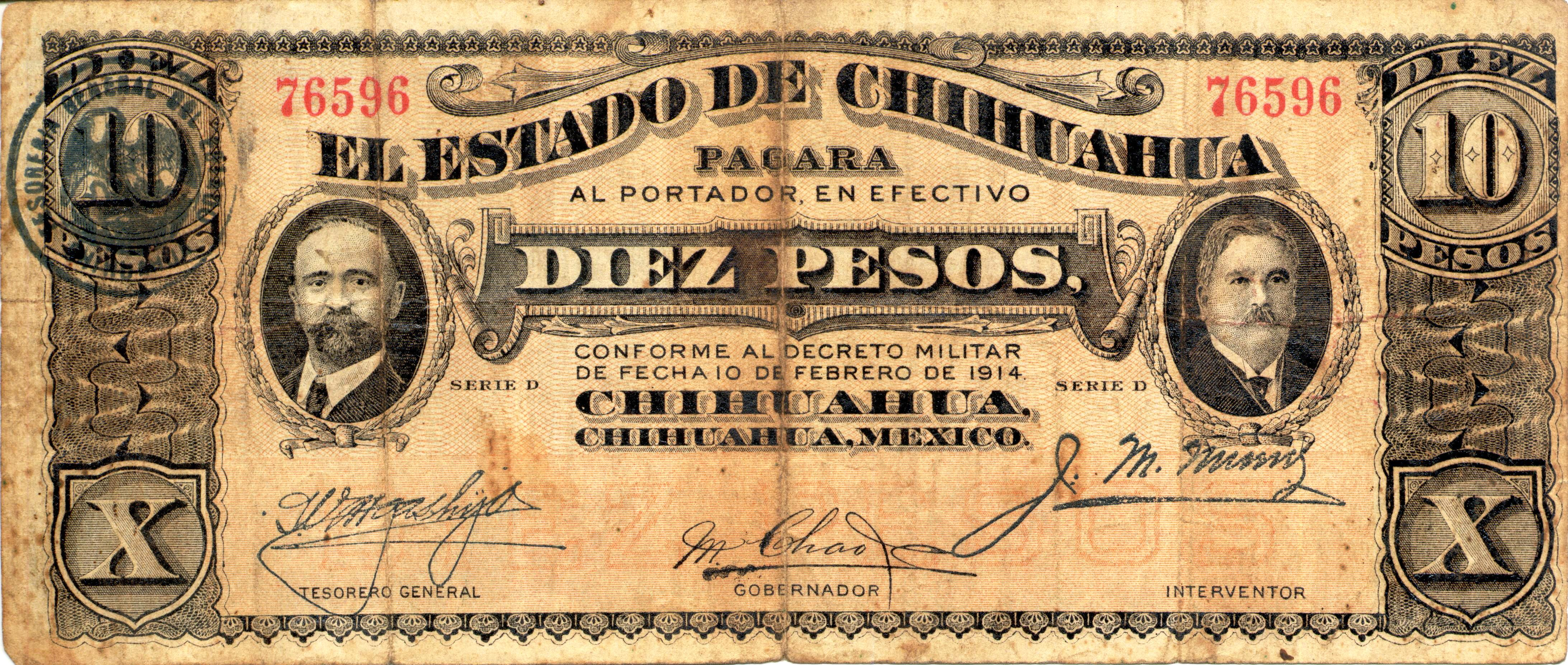 Anverso de un billete de 10 pesos emitido en el Estado de Chihuahua por las fuerzas revolucionarias en 1914. Es conocido comúnmente como "dos caritas" pues ostenta los retratos de Francisco I. Madero y Abraham González.